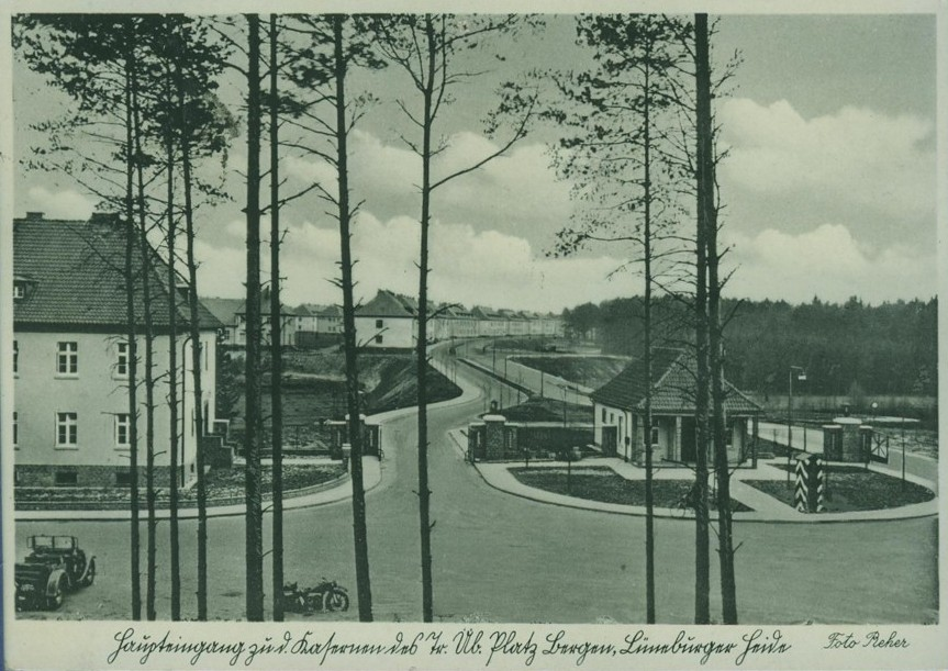 Truppenübungsplatz Bergen in den 30er Jahren. Kartentext: „Haupteingang zu d.Kasernen des Tr. Üb. Platz Bergen, Lüneburger Heide“